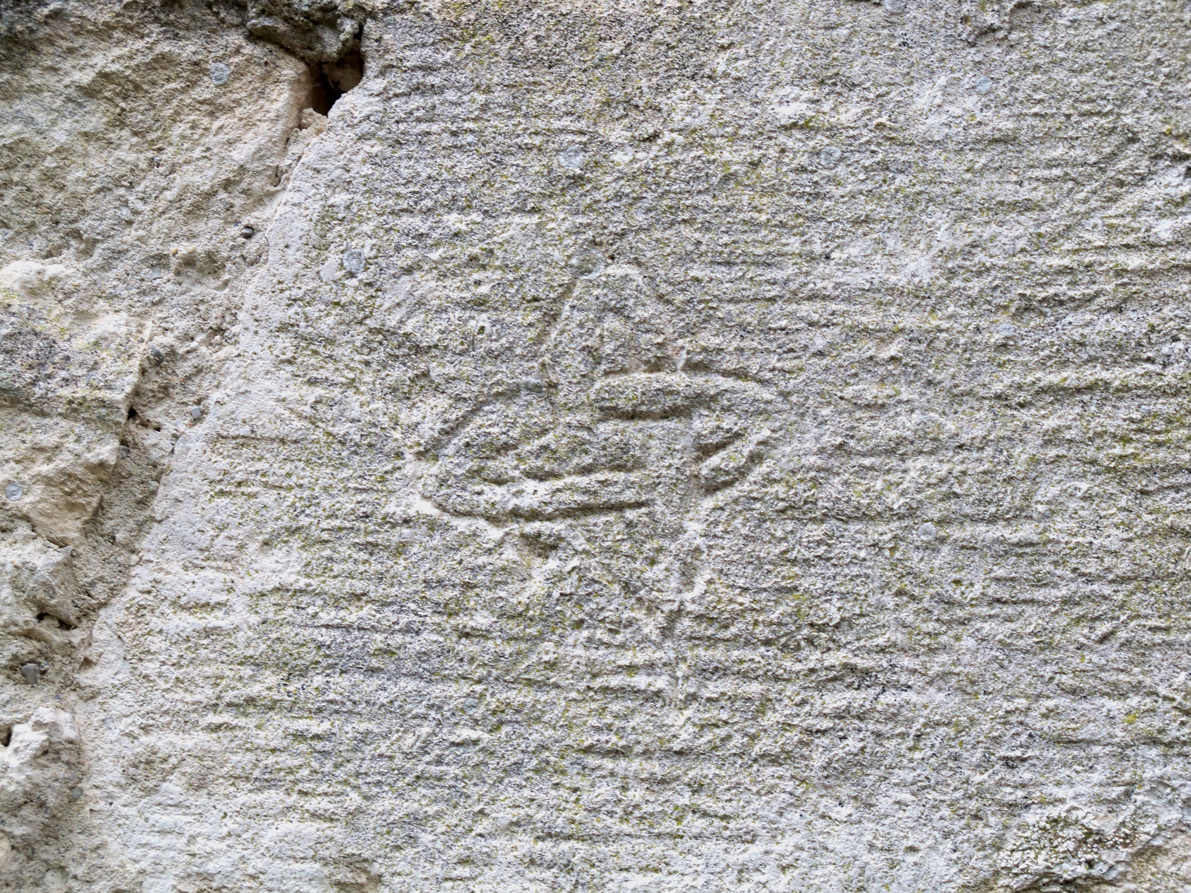 signe sur une des pierre de la chapelle du Prieuré de Carluc, à Céreste, Alpes de Haute Provence, France